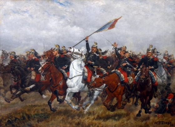 French Dragoons Charging; la garde du drapeau